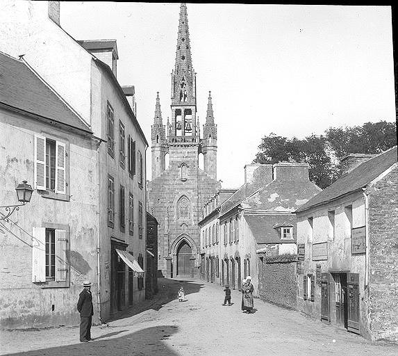 Plougastel-daoulas : une rue et la façade de l'ancienne église au début du XXe siècle